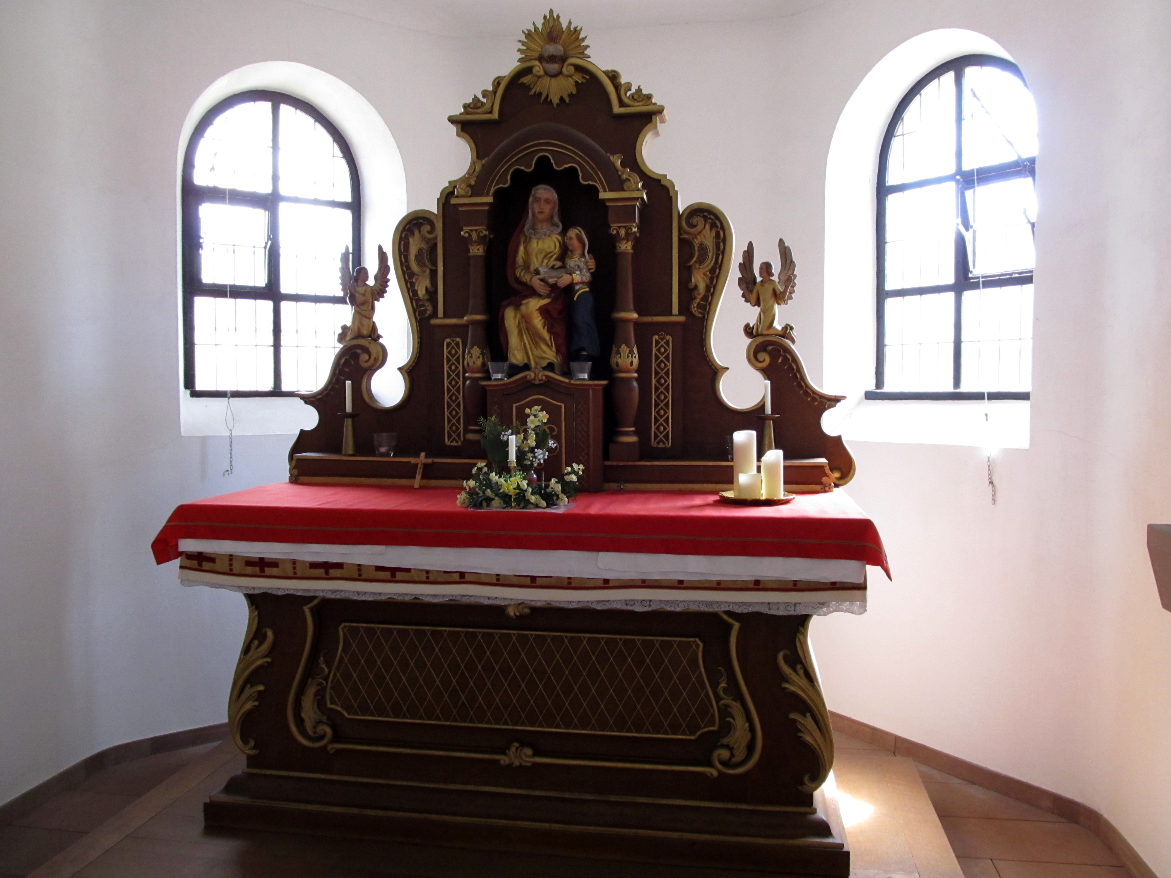 Hochaltar der St. Annakapelle in Habkirchen, Gemeinde Mandelbachtal, Saarland